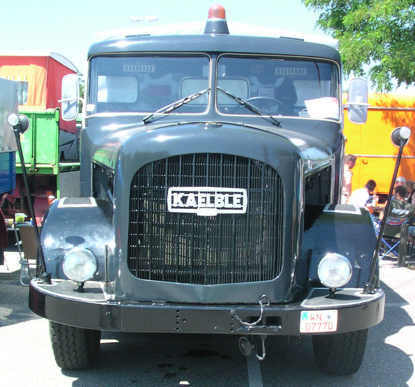 Kaelble K 632 ZB 62, ehemalige Bundesbahn-Zugmaschine in Wörth am Rhein beim Oldtimer-Treffen bei Daimler-Chrysler